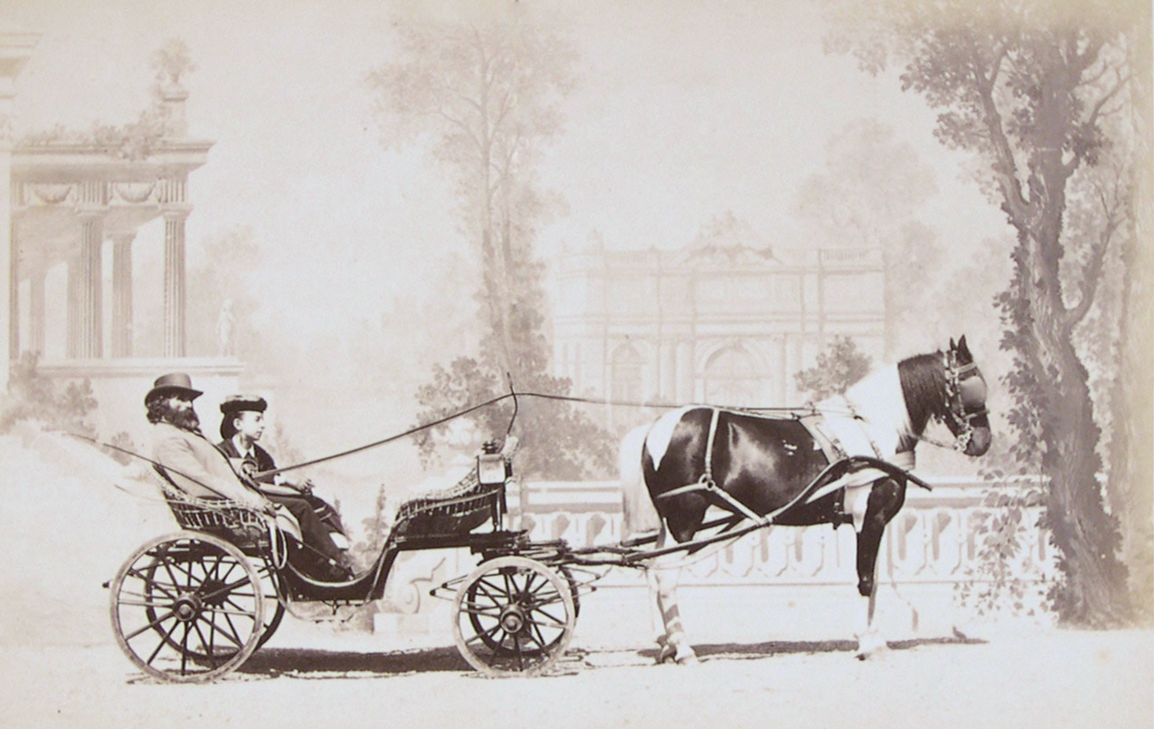 Monsieur Adam Salomon dans une victoria grand-duc